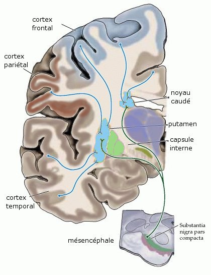 connexions corticostriée